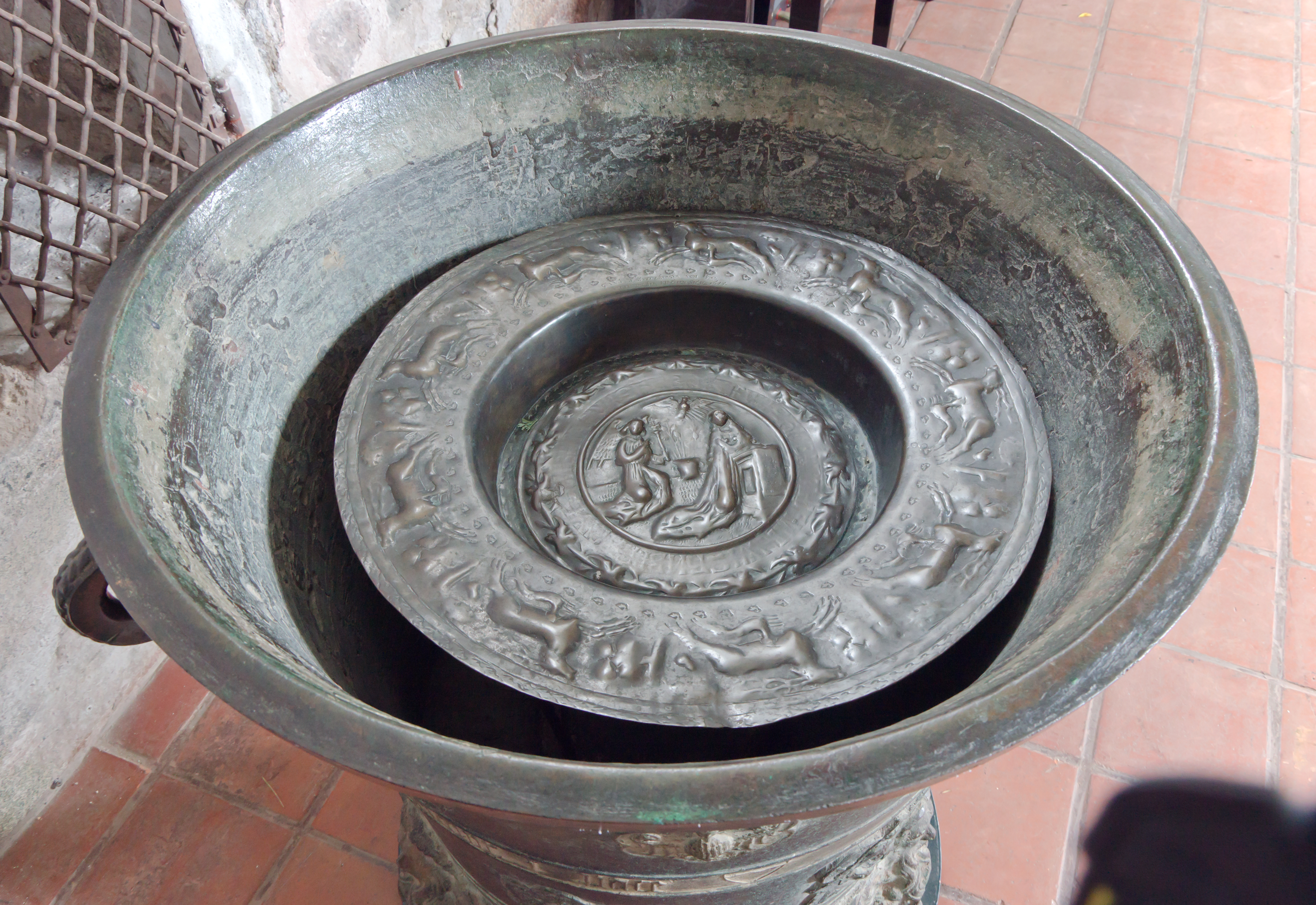 Kirche Siek Bronzetaufe - Der kupferne Einsatz stamt nicht von Gerhard Cranemann